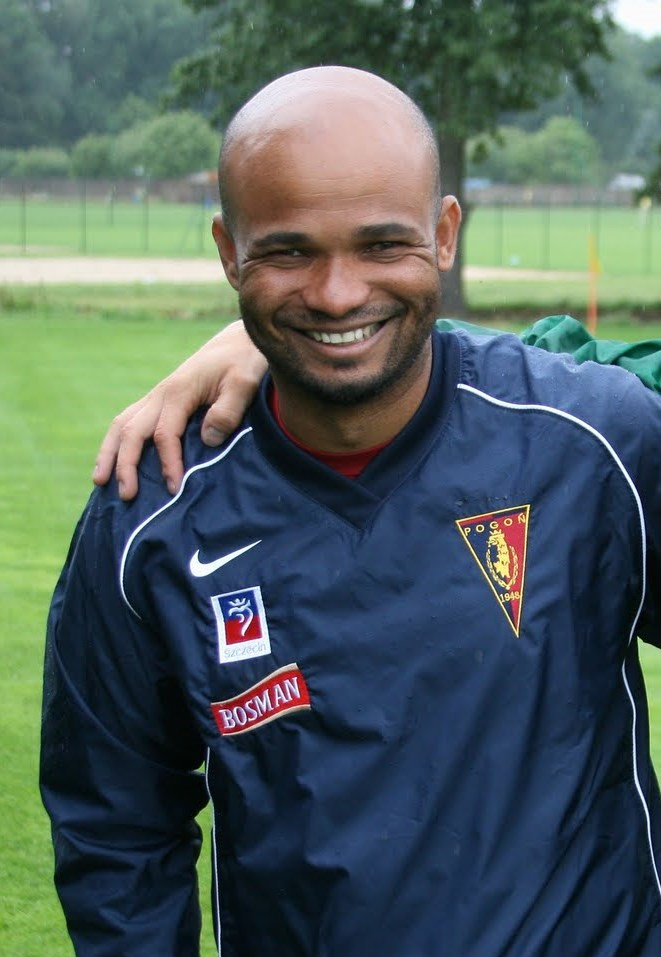 Brazylijski piłkarz Edi Andradina